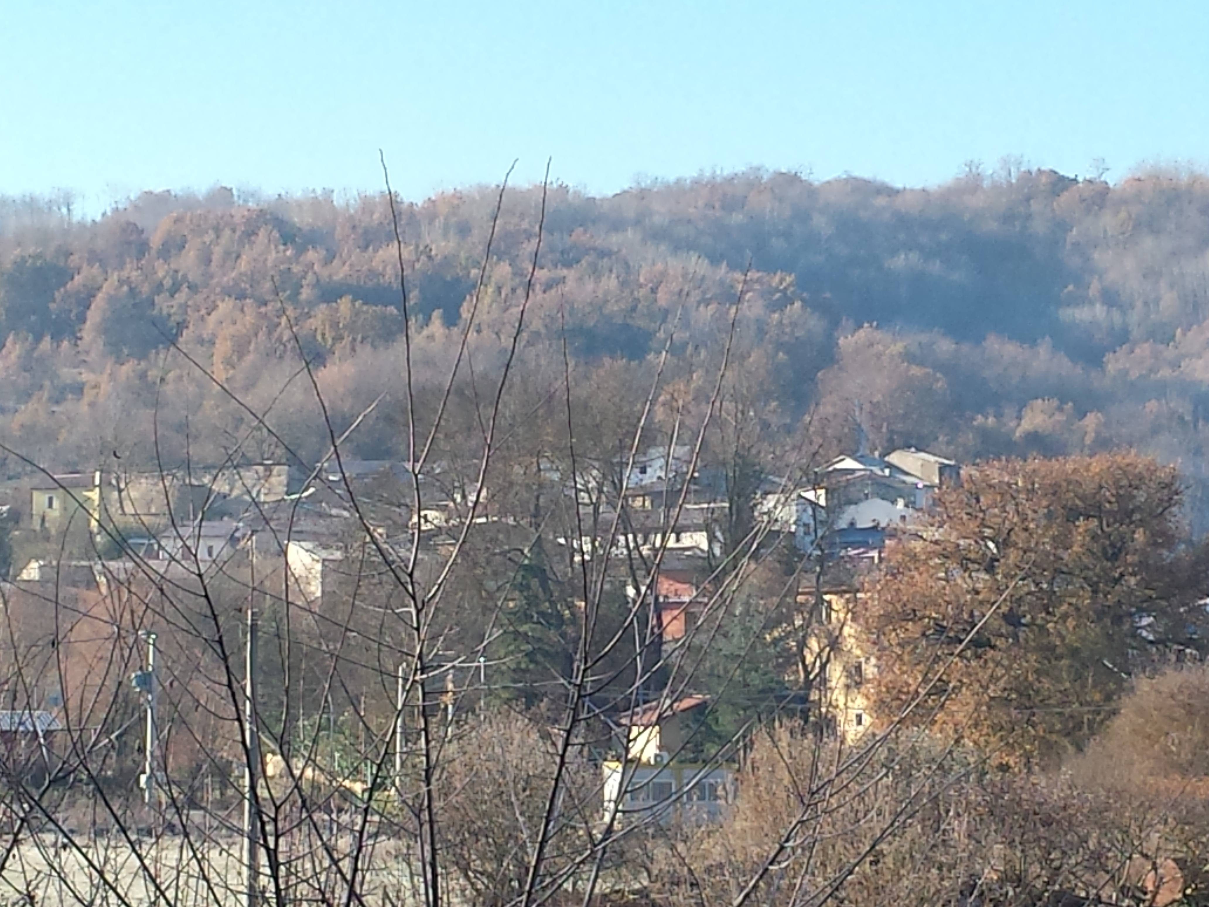 Pagliare di Sassa (L'Aquila)